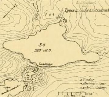 Plan topographique des environs de la ferme de Foss, Vatnahverfi.